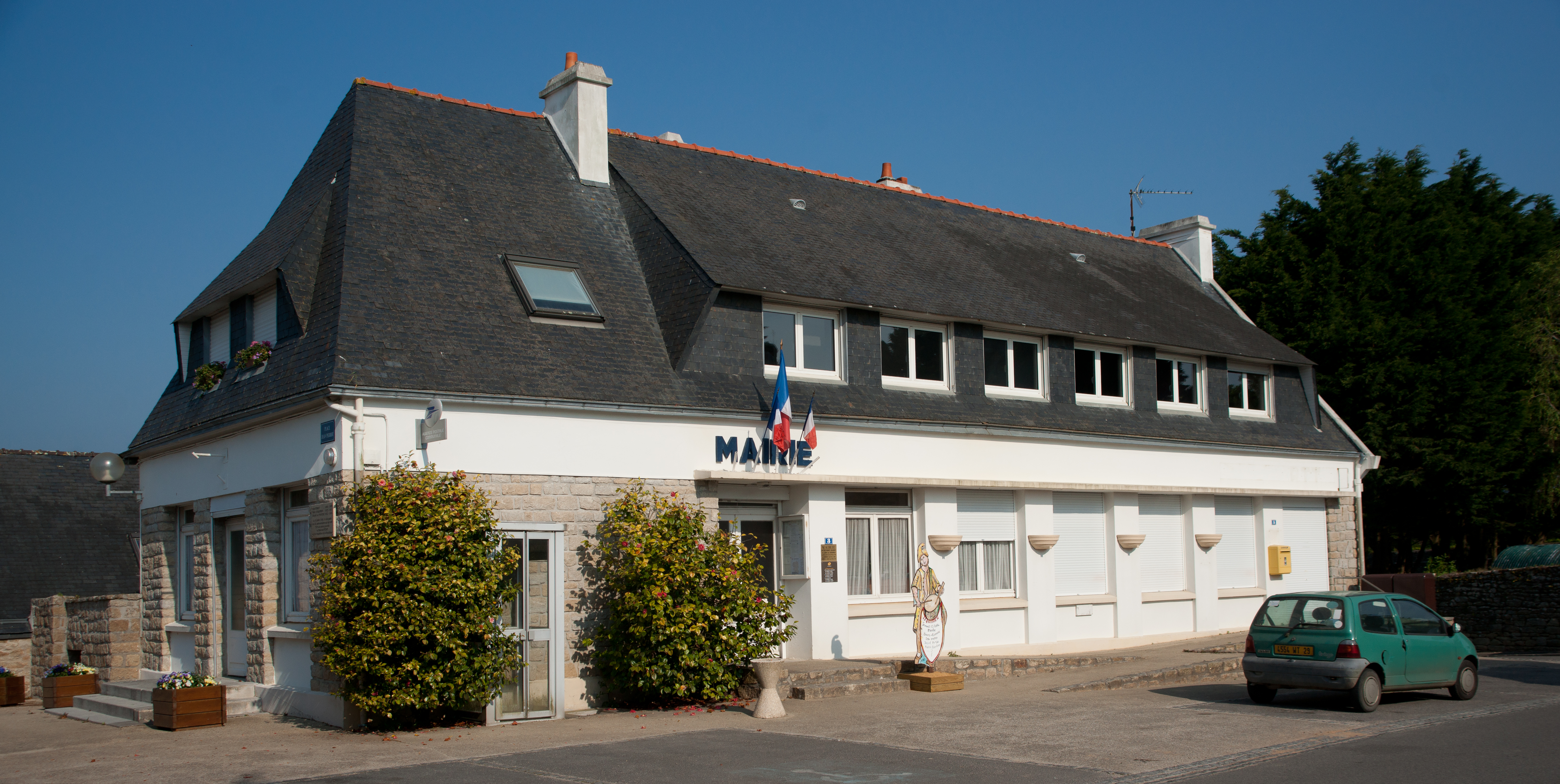 Esquibien - Hôtel de ville